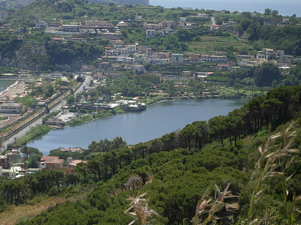 Il Lago di Lucrino visto dal Monte Nuovo, foto personale